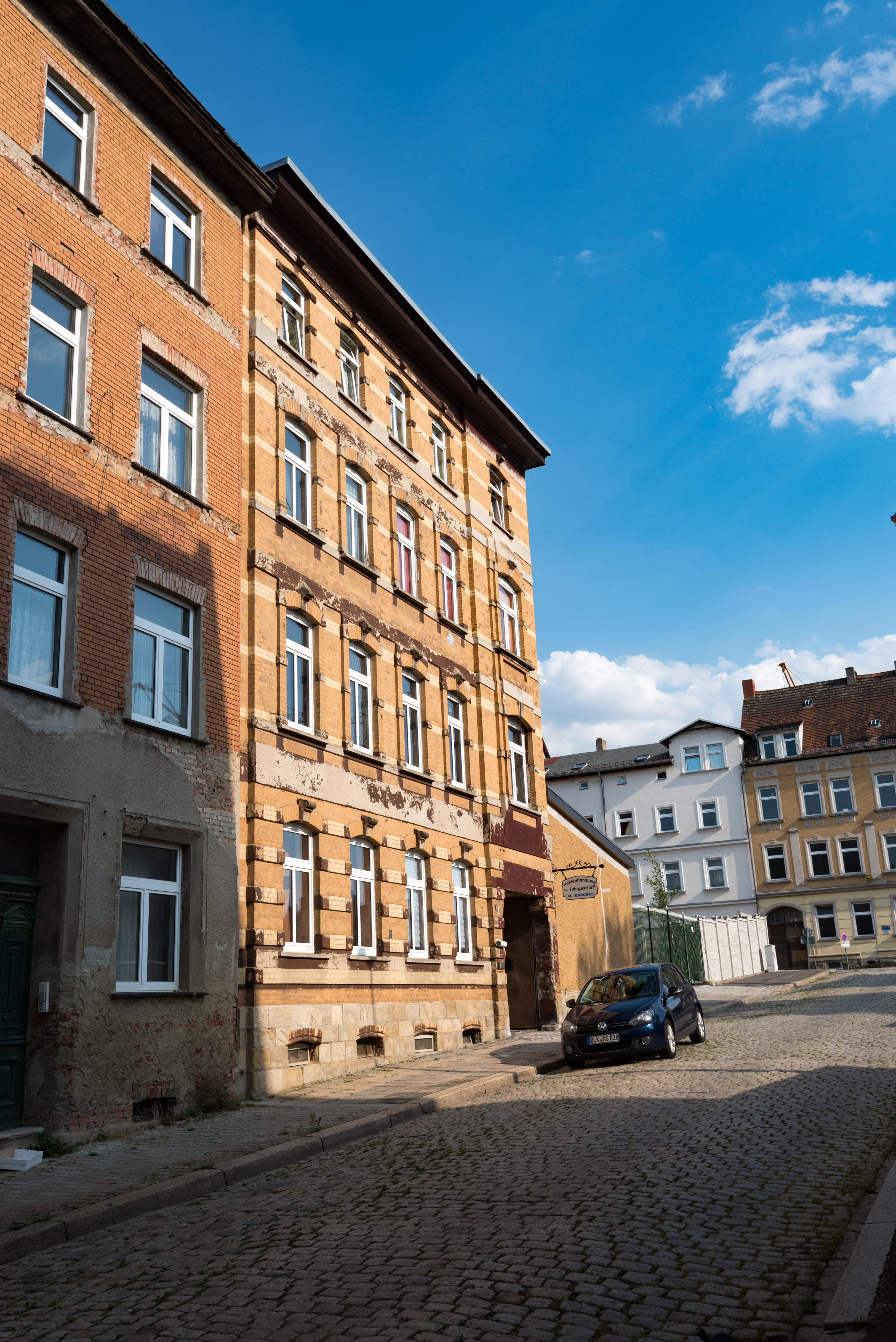 Zeitz, Einsteinstraße 1